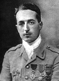 Henri Lemaitre